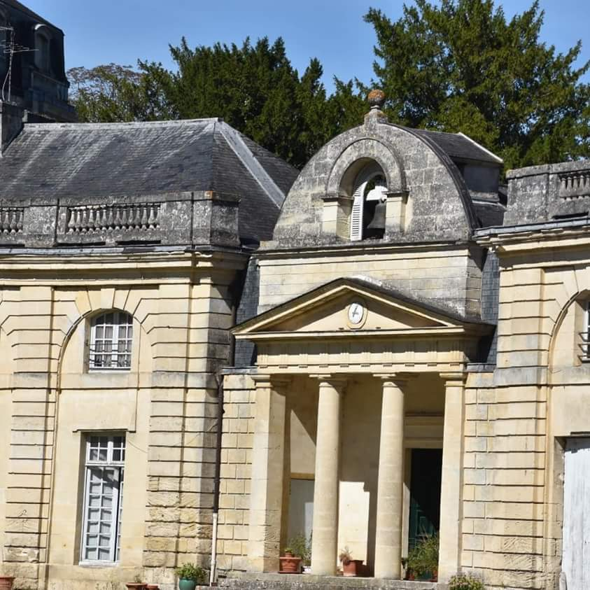 L'entrée royale mais le roi ne vint jamais le roi Louis XV